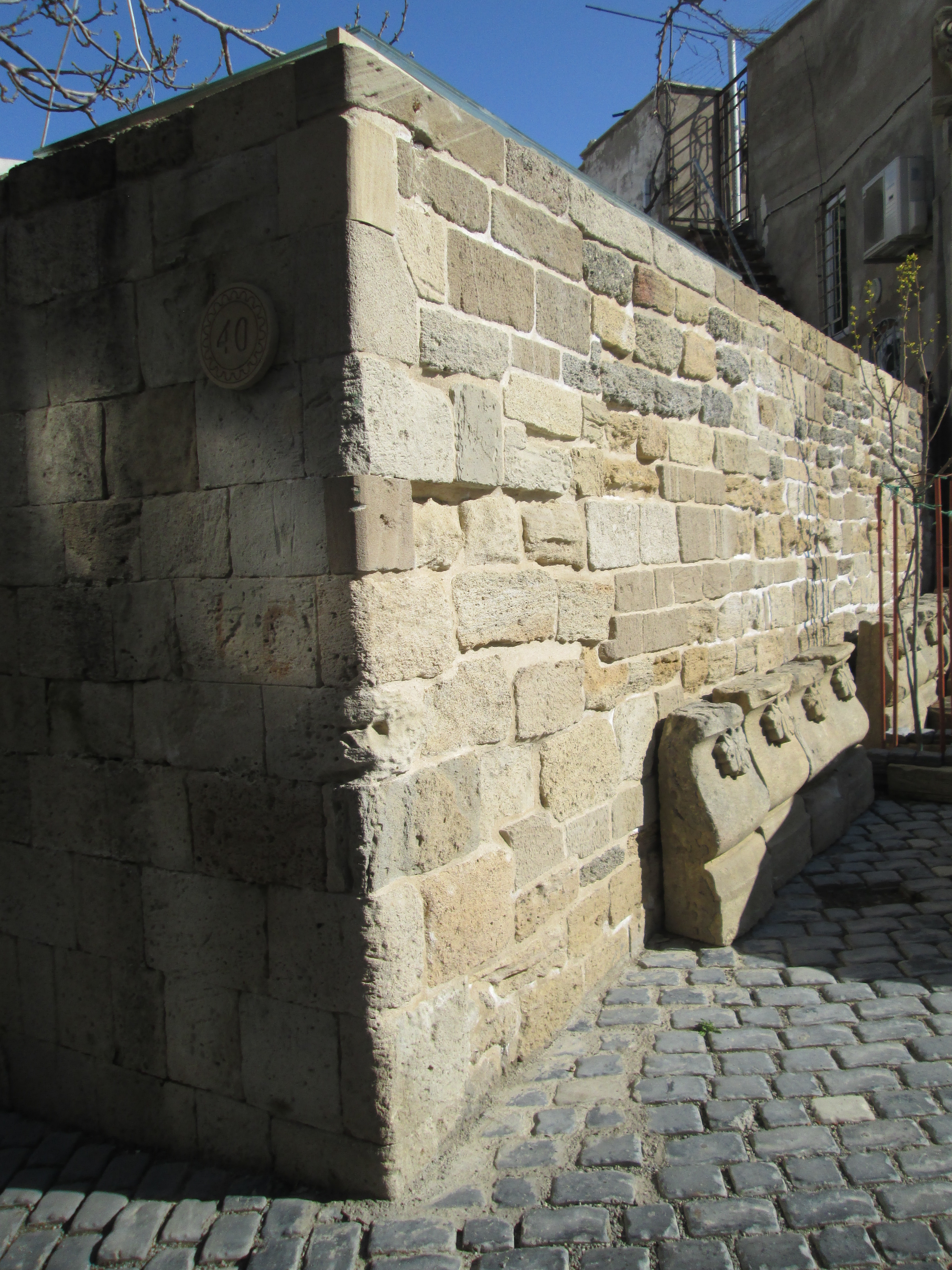 Cin məscidinin arxası